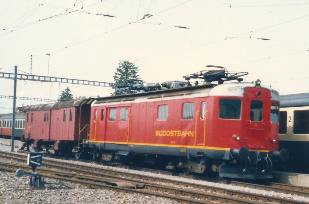 SOB-Lok De 4/4 22 in orange in Samstagern